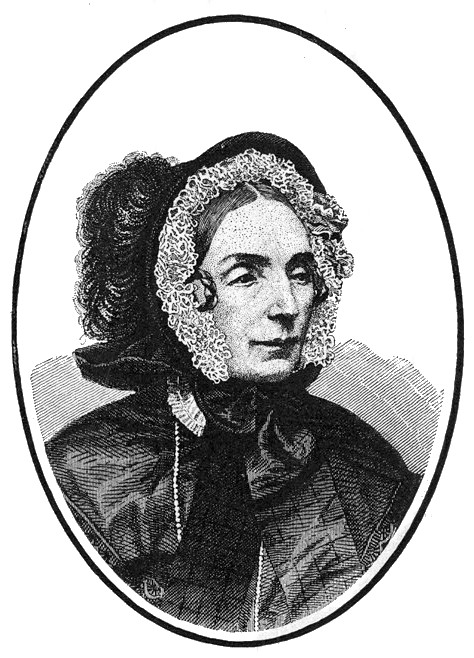 Portrait von Amalie Prinzessin von Sachsen (1794–1870), die als Schriftstellerin unter dem Pseudonym Amalie Heiter bekannt wurde. Das Bild wurde von mir bearbeitet.